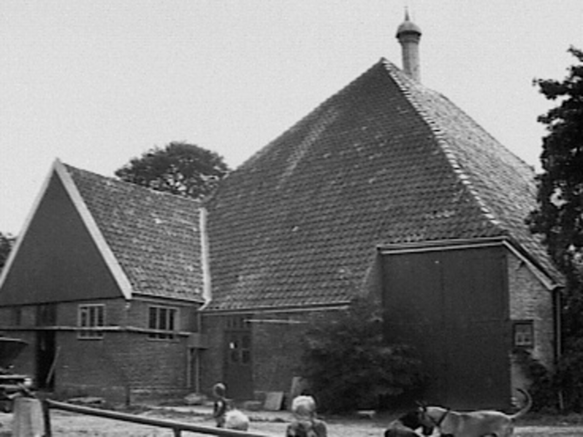 Noordelijk Westfriesland/ Boerderijen: achtergevel (opmerking: Deze afbeelding hebben wij helaas alleen in deze lage resolutie.)